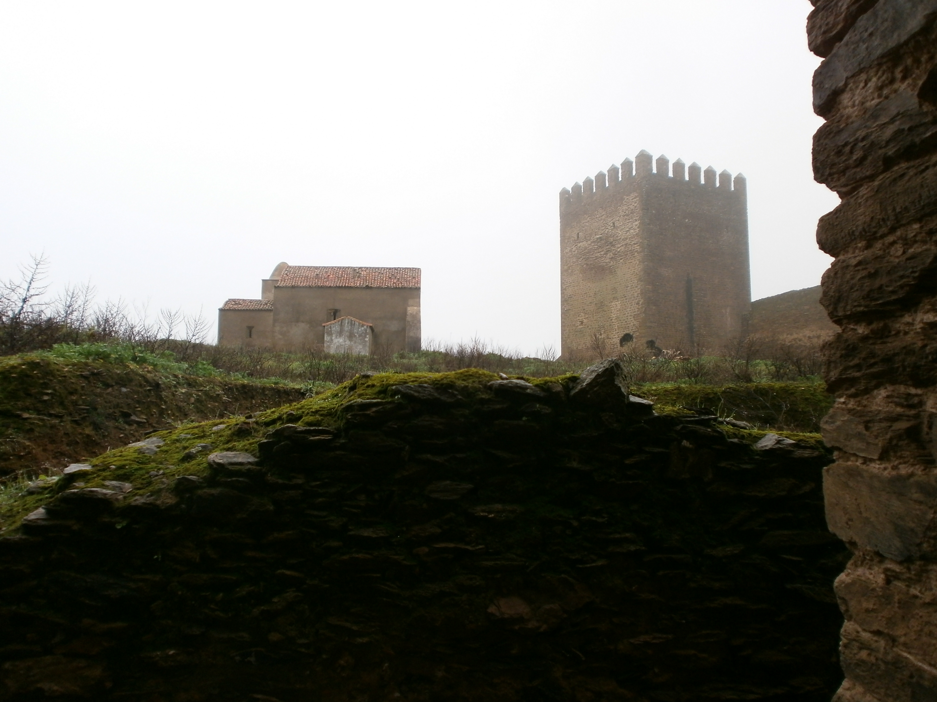 Castelo de Noudar - vista para o interior